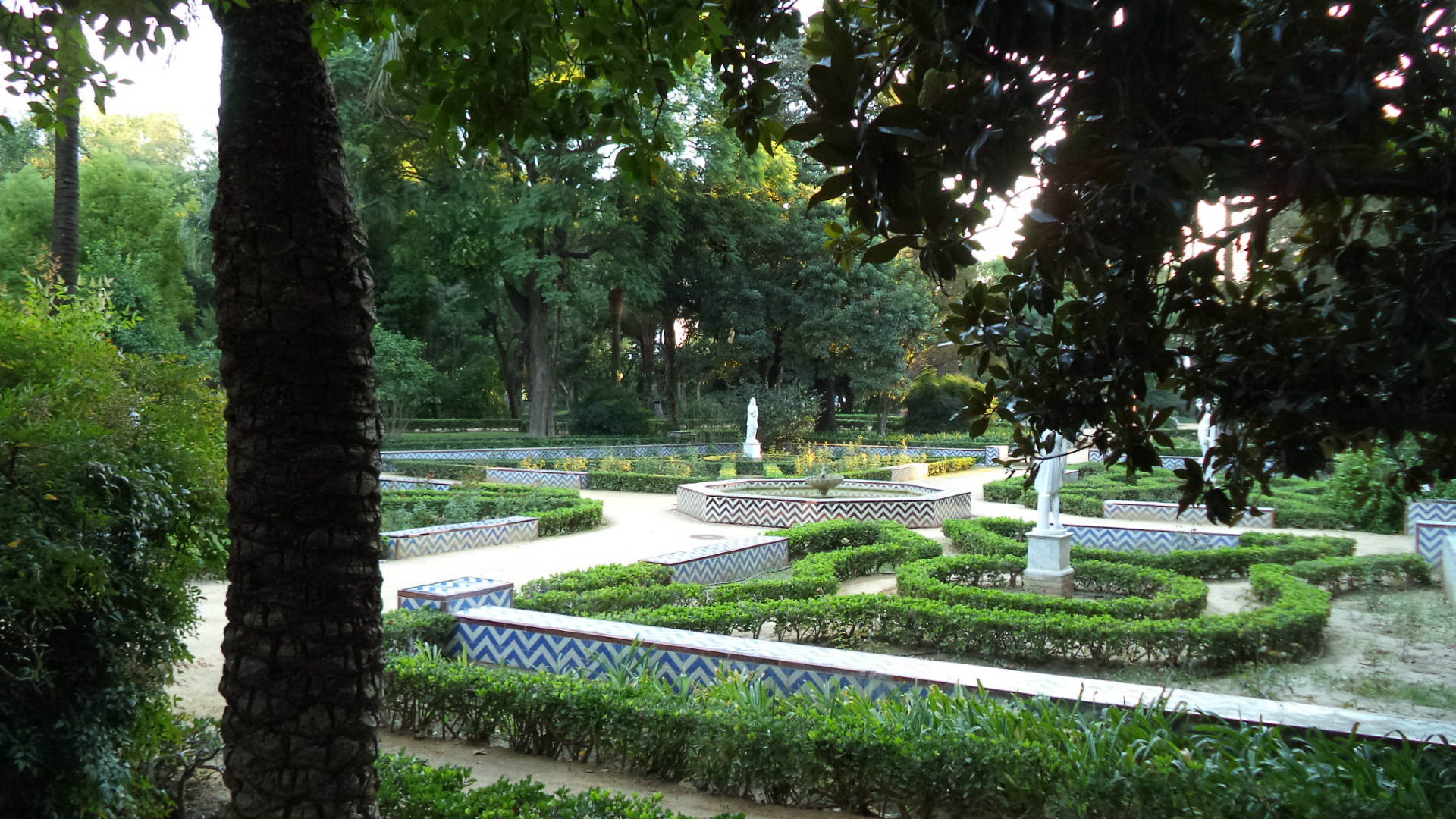 Glorieta de la Concha en el Parque de María Luisa, Sevilla